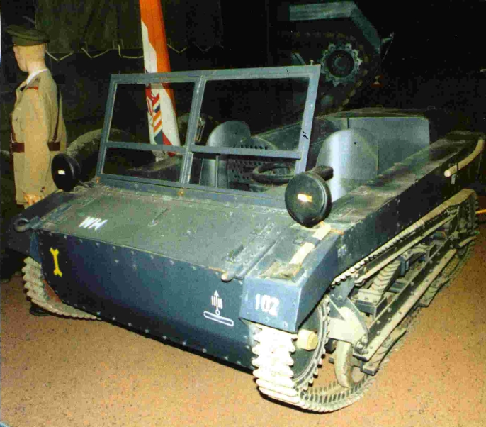 Zachowany do dziś i nieźle odrestaurowany - choć z niemieckim osprzętem i oznakowaniem taktycznym - ciągnik C2P stanowi własność pana Guy Arendta. Pojazd odnaleziony został kilka lat temu na farmie na południu Francji i jest obecnie eksponowany w Victory Memorial Museum w Arlon w Belgii. Bliższych szczegółów na temat dawnych losów tego pojazdu jak na razie brak. [opis oryginalny]